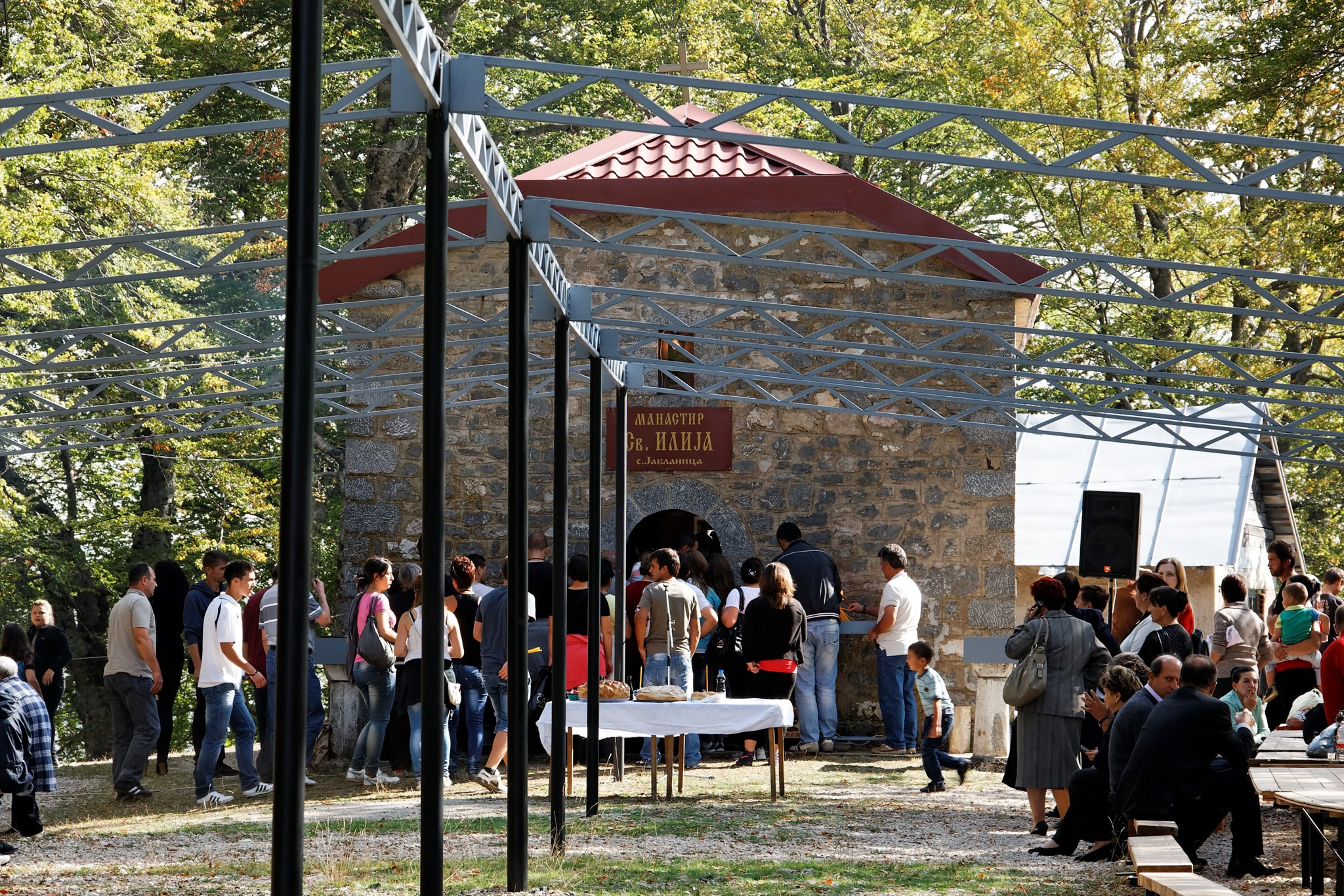 Манастирска црква „Св. Илија“ во селото Јабланица